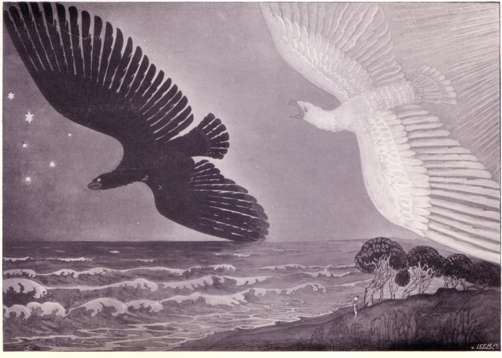 De dag en de nacht